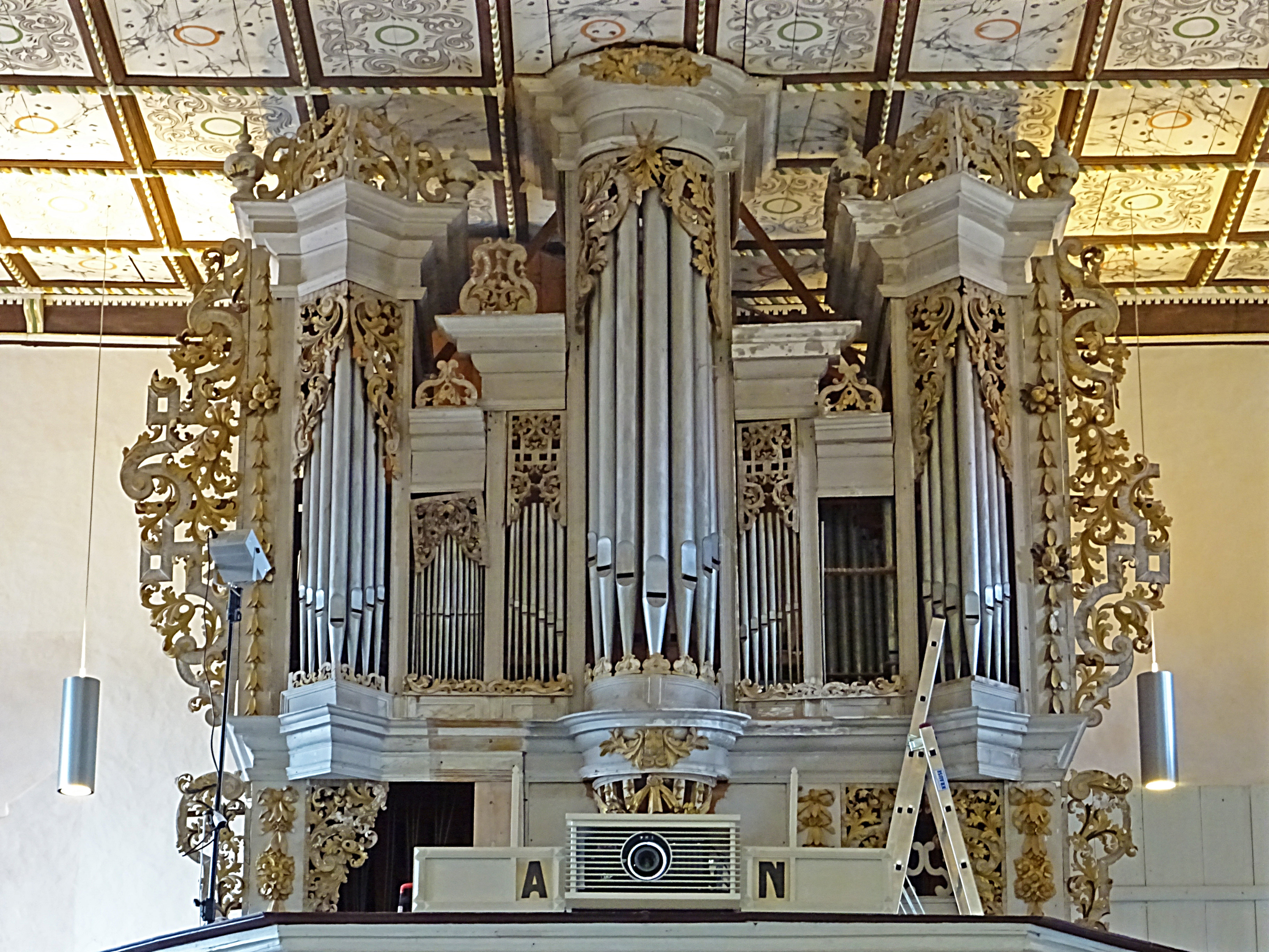 Orgel von Conrad Wilhelm Schaefer 1737 (Umbau im älteren Prospekt) + Otto Petersilie (1903 neues Orgelwerk) in der Stadtkirche St. Peter und Paul (Weißensee)